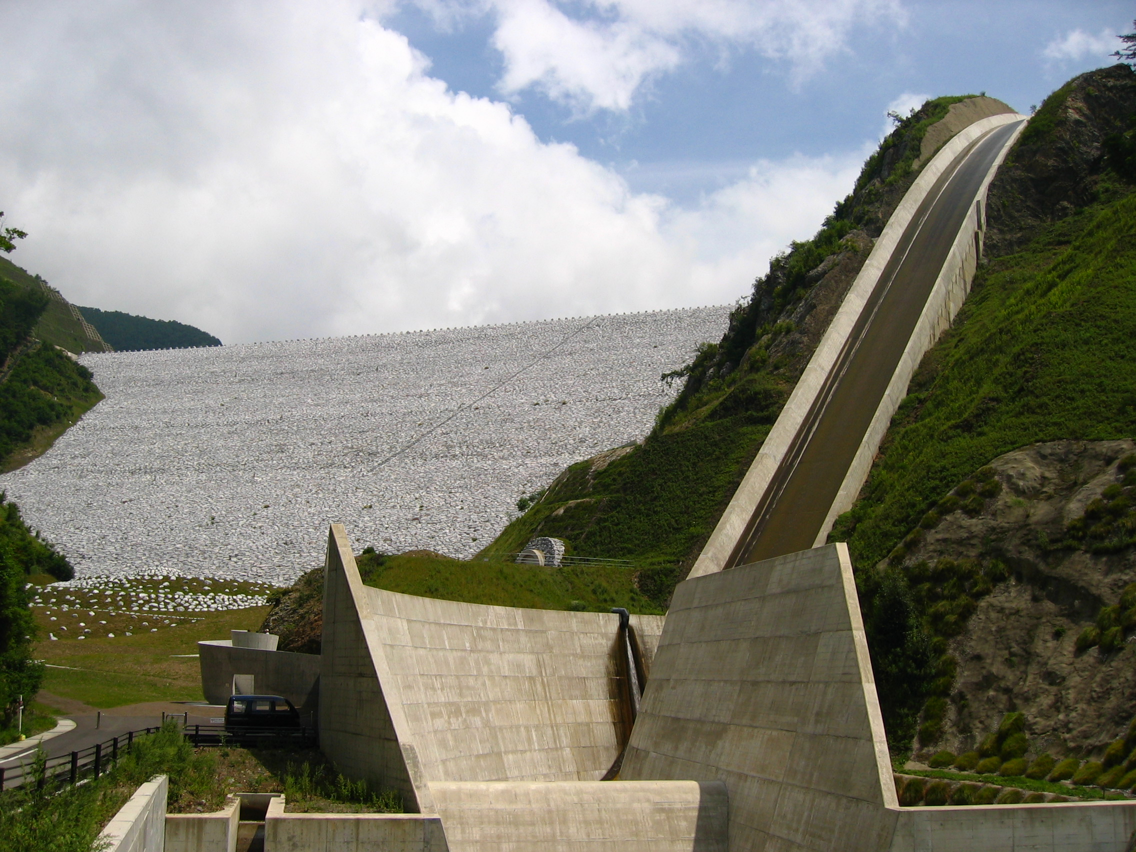 Minamiaiki Dam (南相木ダム) is a dam in Nagano, Japan.